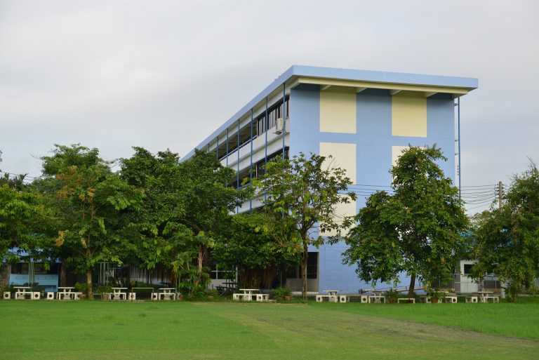 อาคารปฏิบัติการ ด้านวิทยาศาสตร์